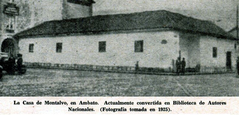 Fotografía de la casa del escritor Juan Montalvo en Ambato, Ecuador. Fotografía tomada en 1925